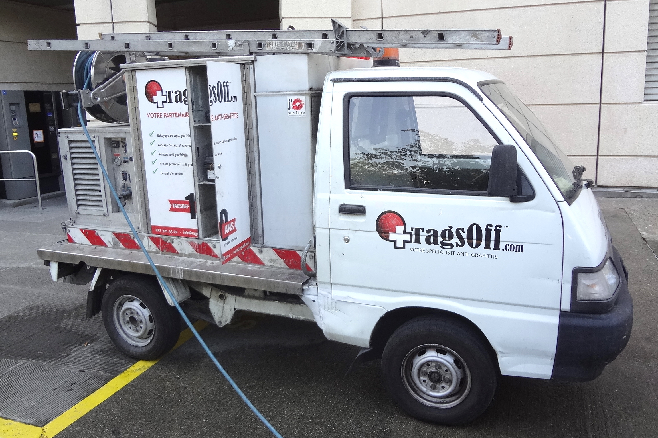 Véhicule d'une entreprise d'effaçage de graffitis à Genève, devant Uni-Mail (entrée ouest).